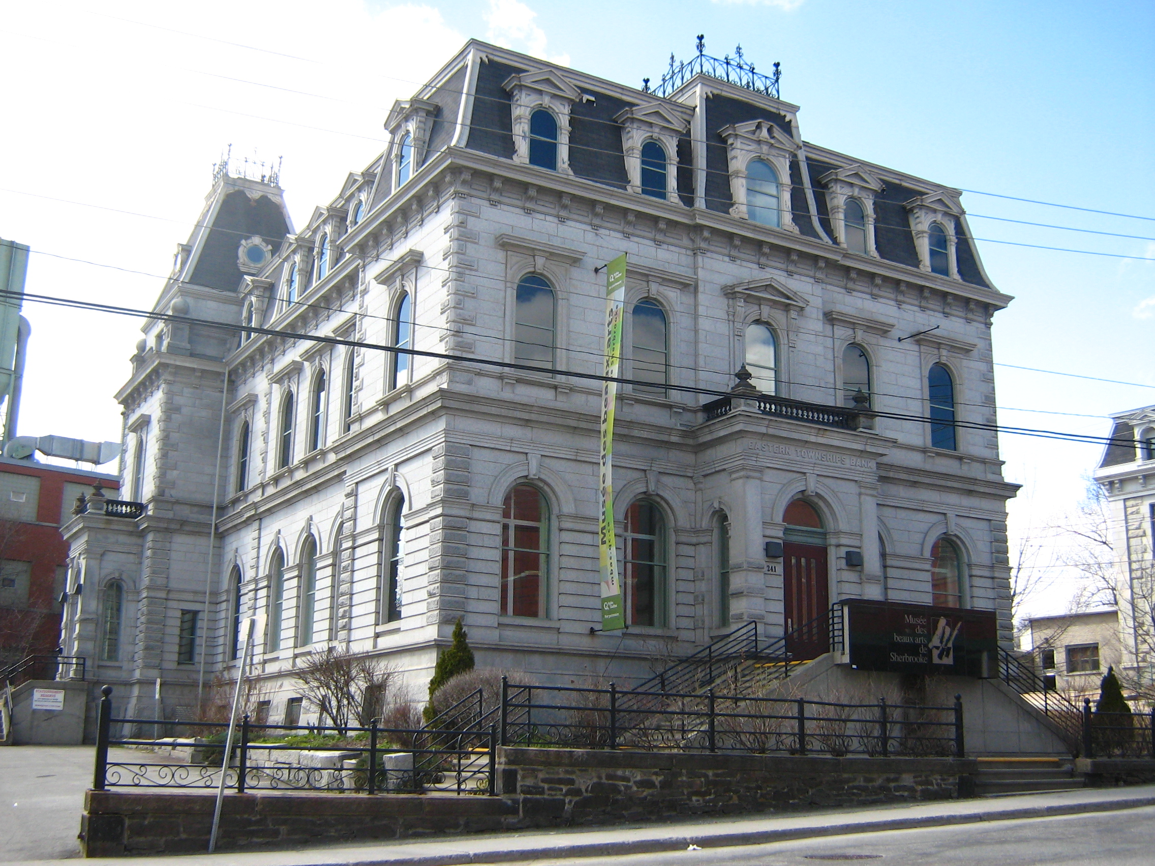 Ancien édifice de l'Eastern Township Bank